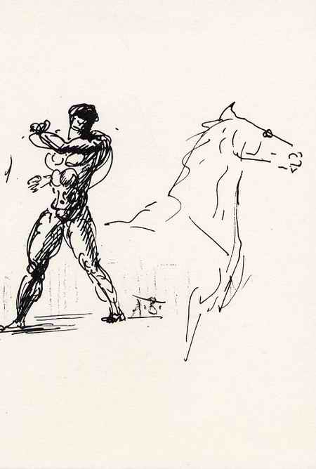 Copyright Museum Arno Breker/MARCO-VG, Bonn Toestemming publicatie.